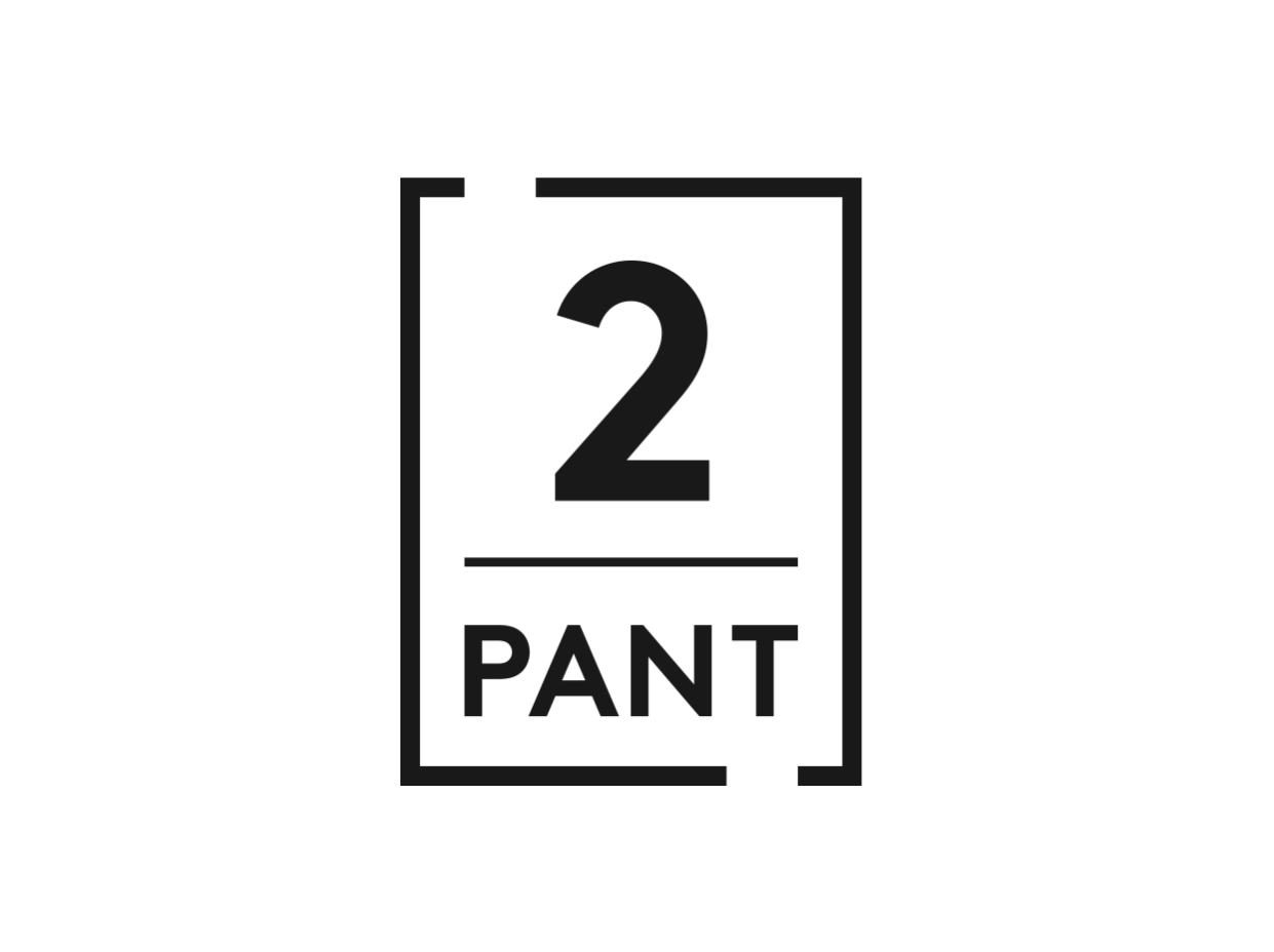 Pantemerke for norske flasker og bokser med innhold lik eller mindre enn 0,5 liter